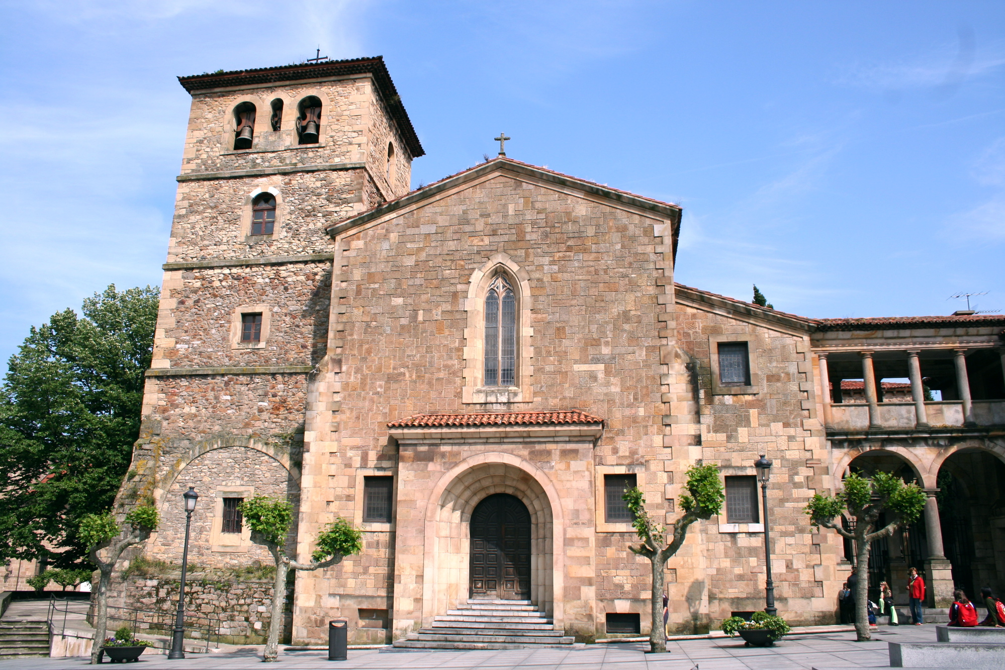 Avilés, Parroquia de San Nicolás de Bari